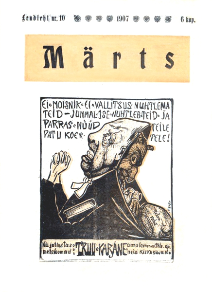 Lendleht nr 10 Märts 1907 esikaas